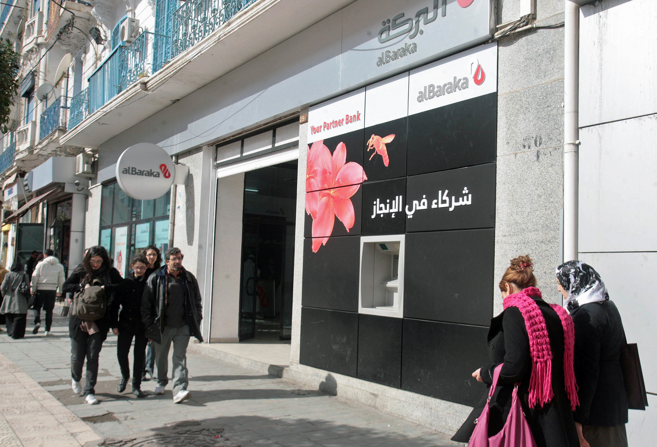 [Lyes Aflou] Al-Baraka Bank is one of the few places where Algerians can find Islamic finance alternatives. بنك البركة هو إحدى المؤسسات القليلة التي يجد فيها الجزائريون بدائل التمويل الإسلامي. La Banque Al-Baraka est l'un des rares endroits où les Algériens peuvent trouver des alternatives financières islamiques. Full story: القصة L'article